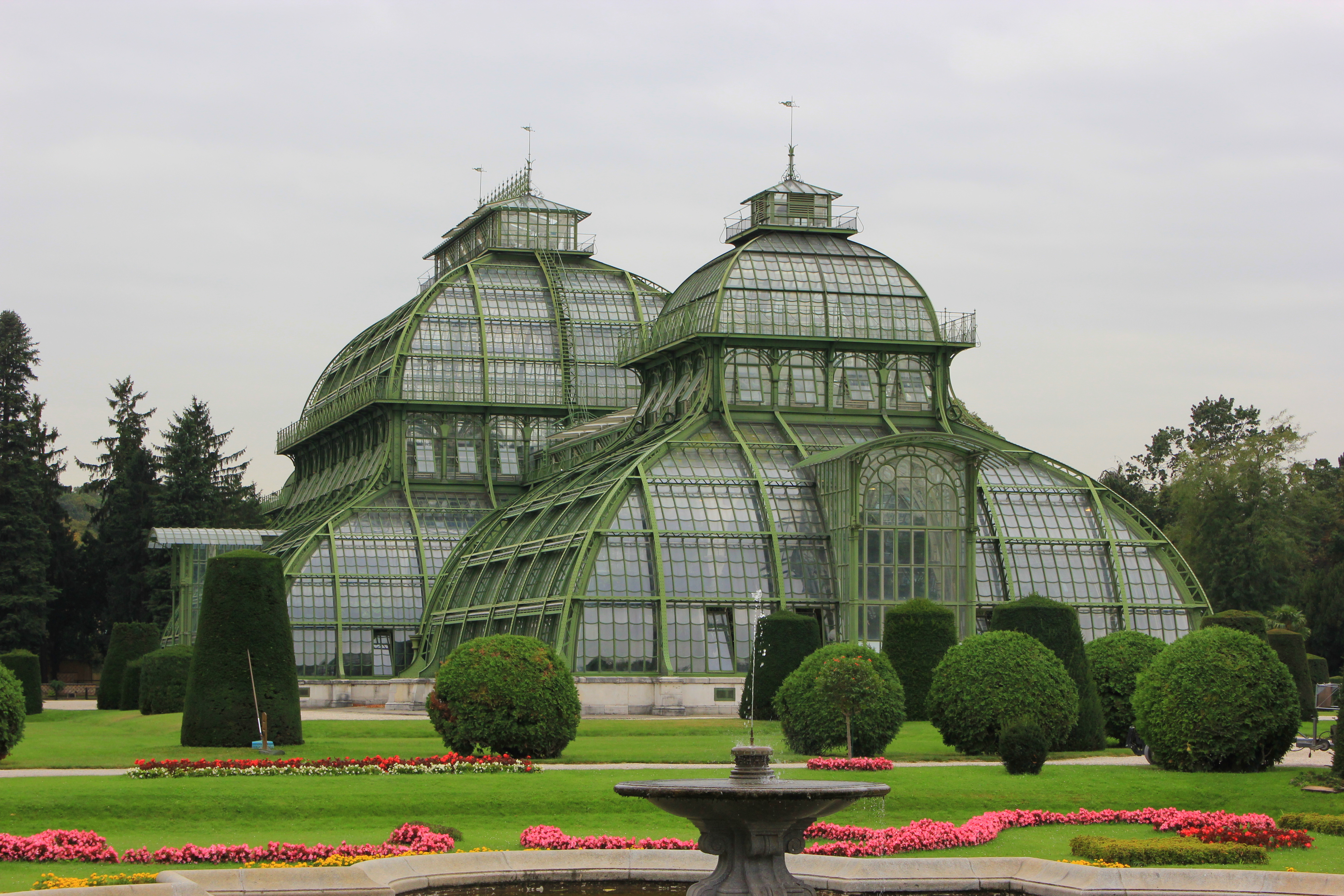 La Casa de las Palmeras (Palacio de Schönbrunn)